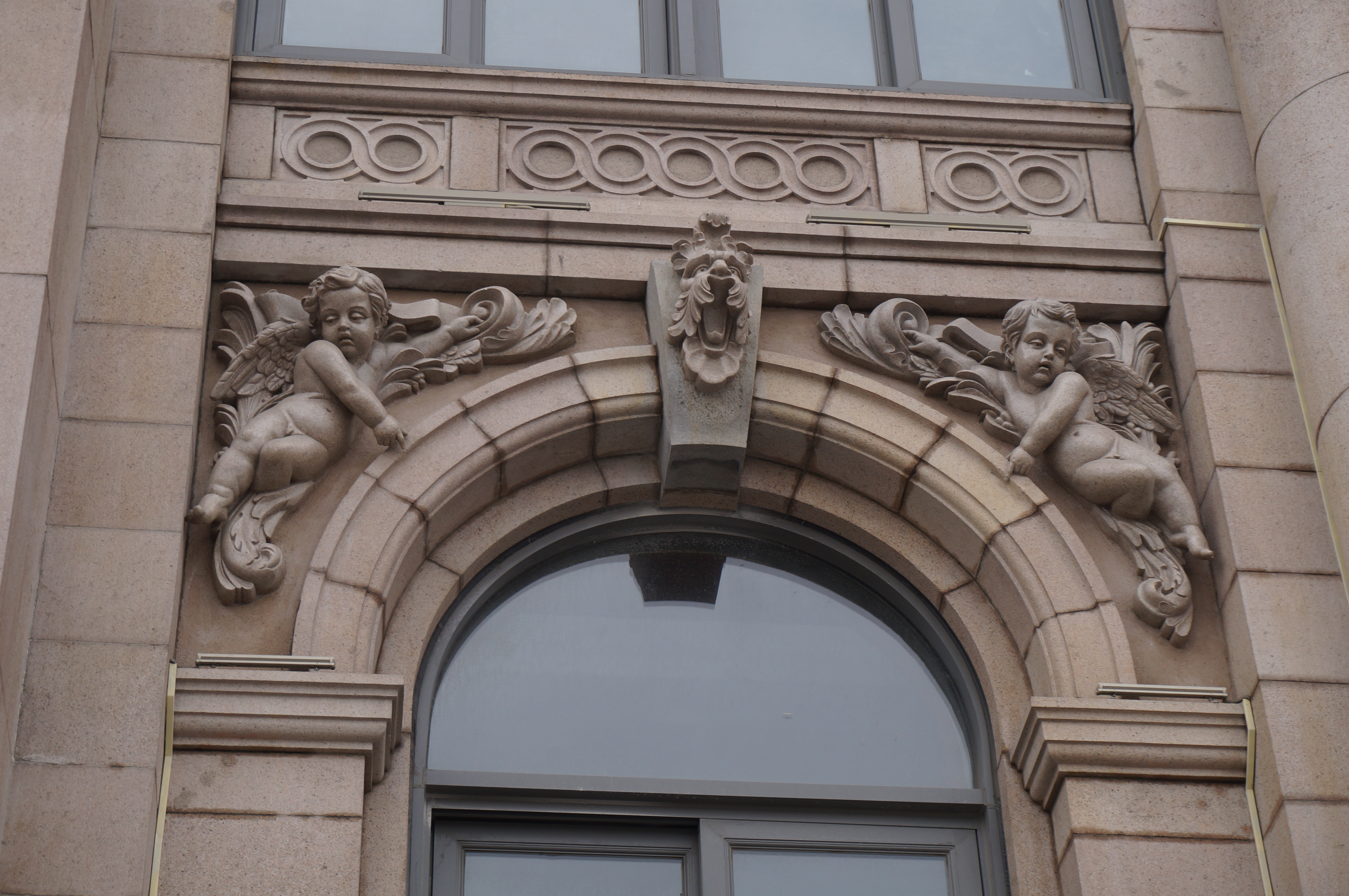 中文（中国大陆）: 原上海华俄道胜银行大楼的一处装饰